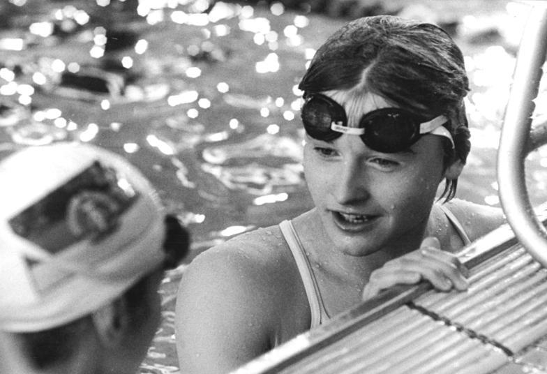 Kornelia Greßler ADN-ZB Kluge 31.7.85 Leipzig: Vorschaumotiv Europameisterschaften im Sportschwimmen vom 6. bis 11. August 1985 im 100-m-Schmetterlingsschwimmen und Vizemeisterin über 200 m, Kornelia Greßler (SC Turbine Erfurt- Foto von den DDR-Titelkämpfen 1985 in Leipzig). Ihre Bestzeiten über beide Strecken sind 1:00,20 und 2:12,25 min. Achtung! Sperrfrist! Freigabe durch ADN-Meldung (Nominierung) am 1.8.85.